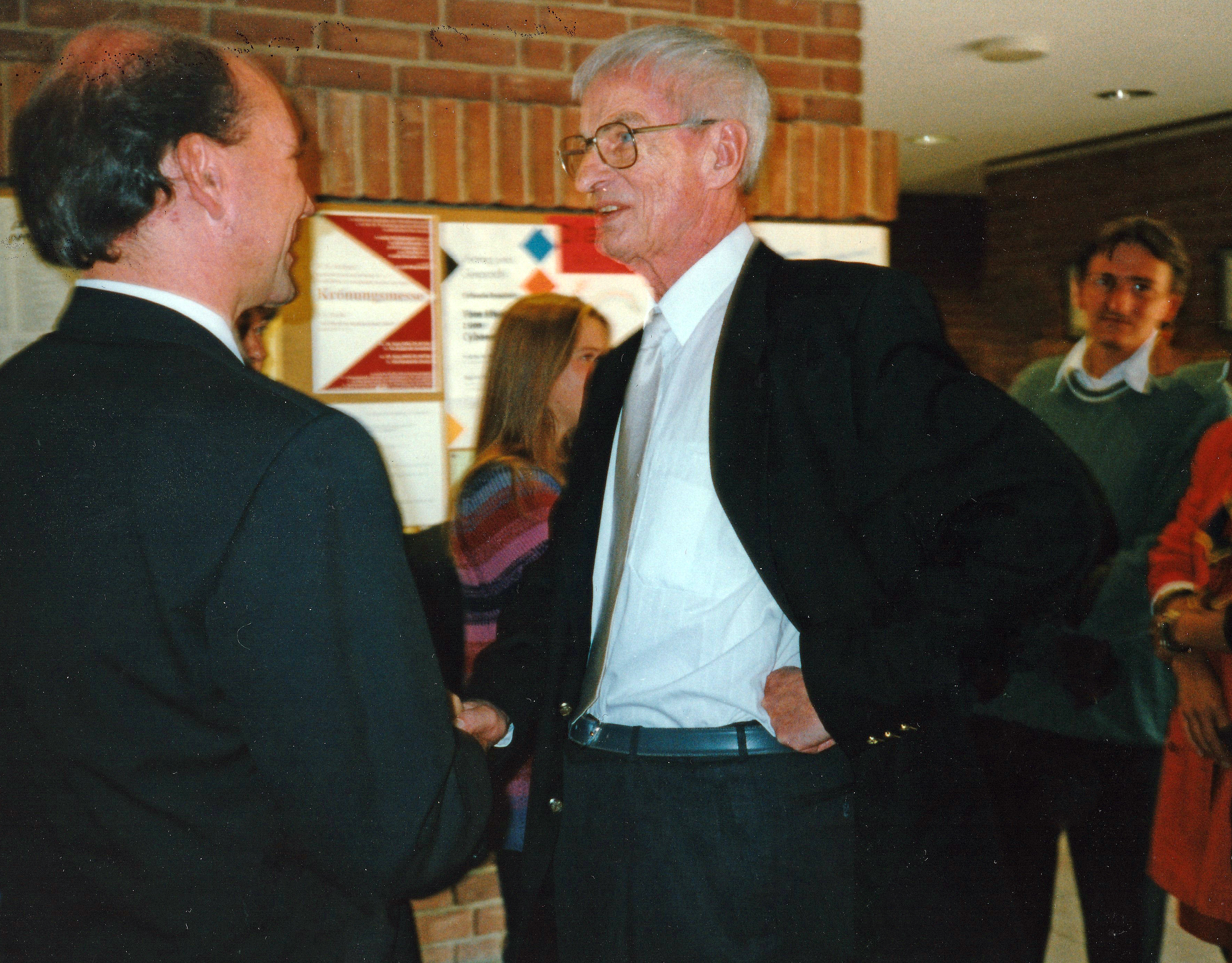 Am 11. September 1994 wurde im Foyer der Dietrich-Bonhoeffer-Kirche der Empfang anläßlich des 80. Geburtstages von Stadtsuperintendent i. R. Rufus Flügge gedacht. Hier gratuliert Dechant Bernd Galluschke von der kath. St. Martin-Gemeinde in Hannover-Roderbruch